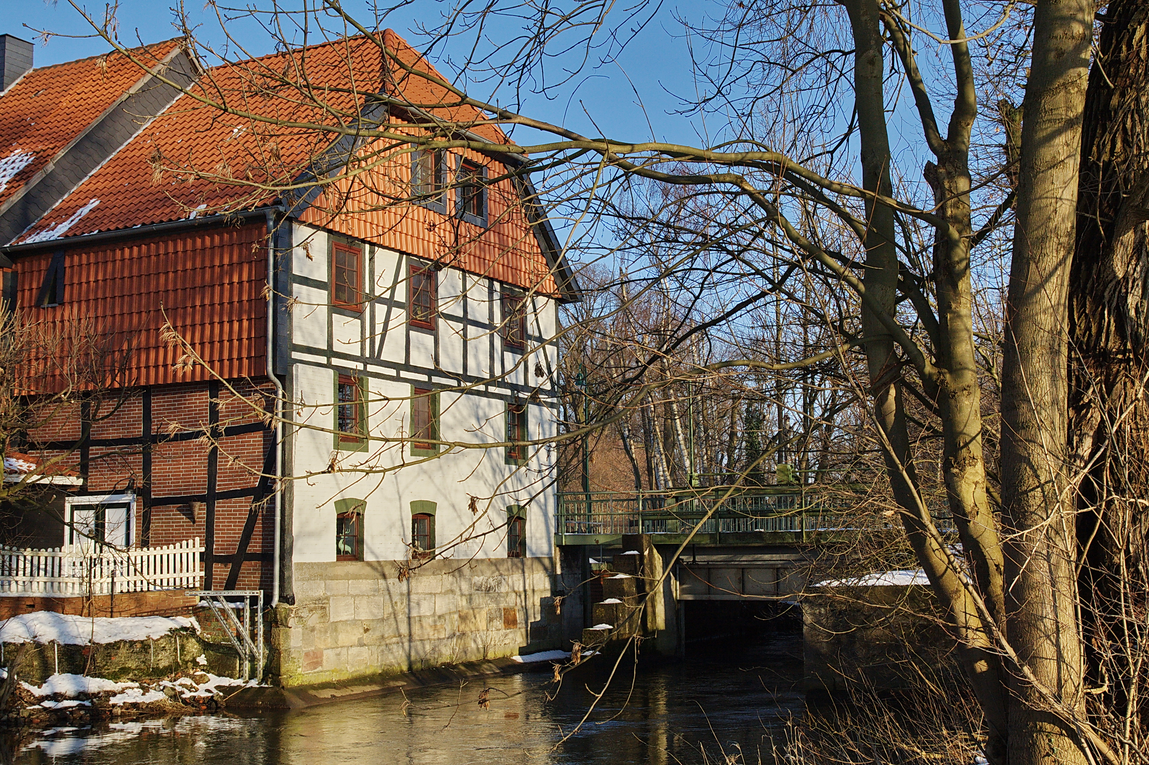 Berger Wassermühle an der Fuhse in Eixe (Peine), Niedersachsen, Deutschland